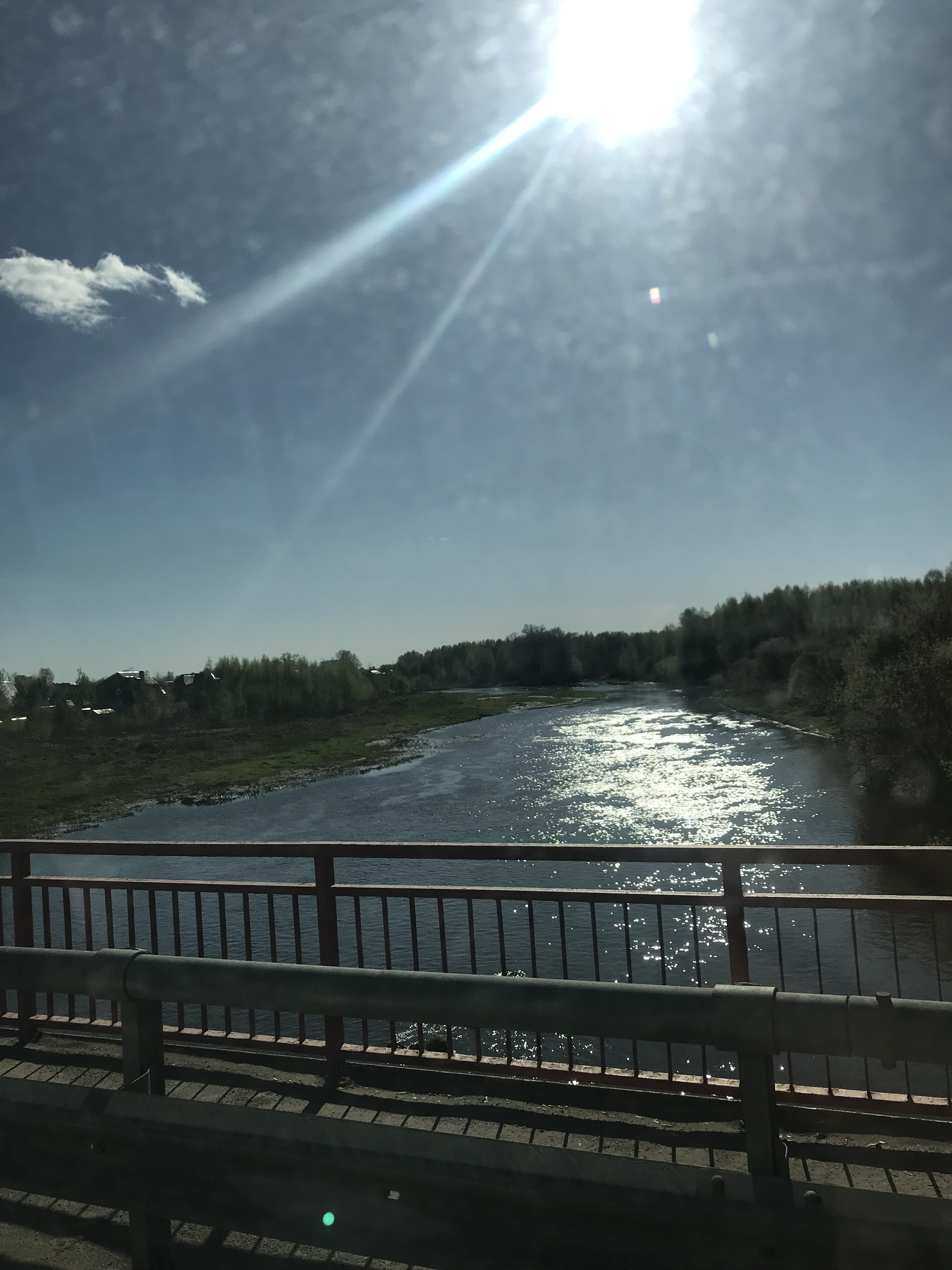 Клязьма в черте города Павловский Посад. Вид с моста, ведущего на Большие Дворы и далее на М7